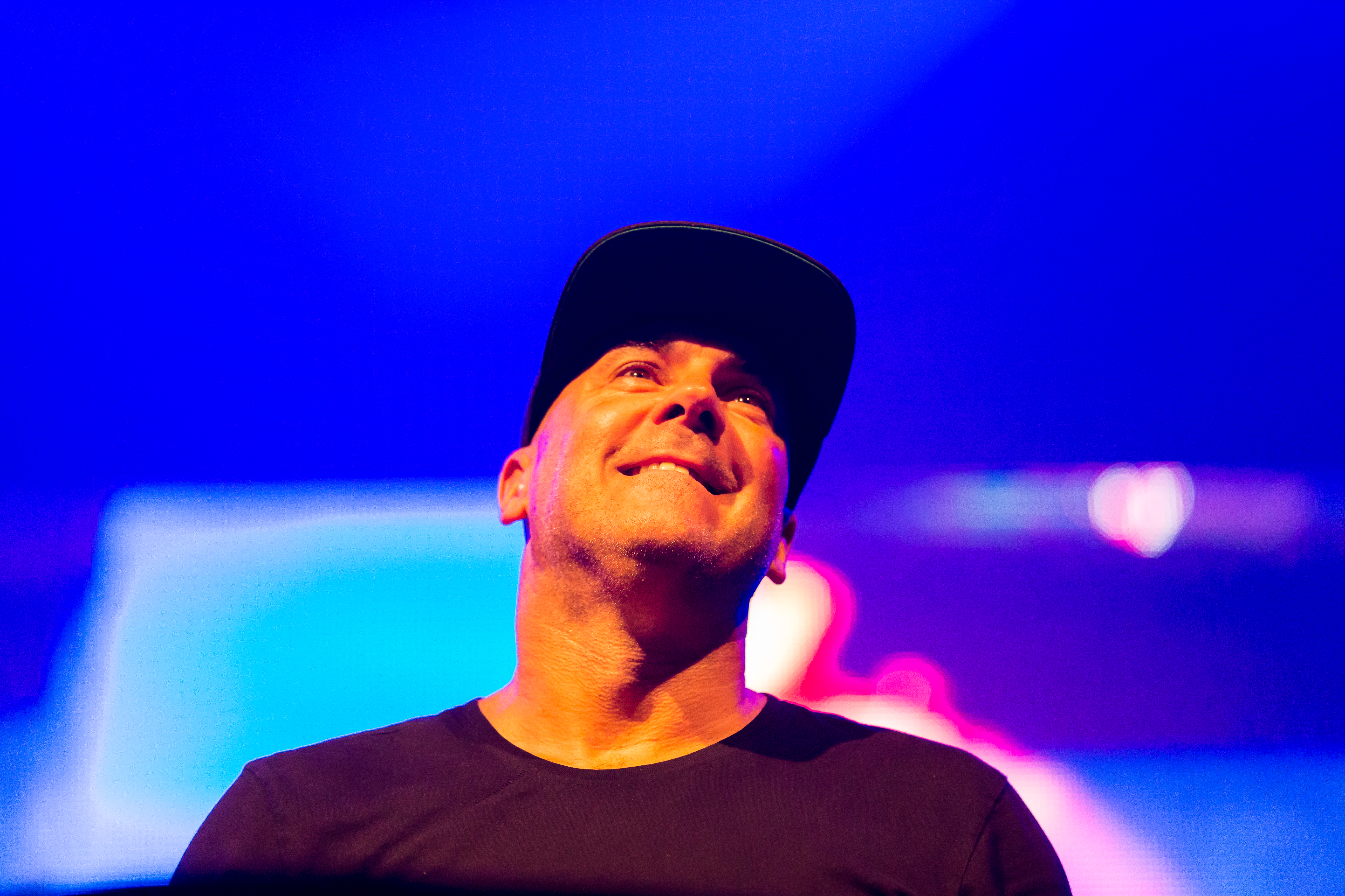 Charlie Lownoise & Mental Theo during sunshine live "Die 90er - Live on Stage" at Maimarkt Halle, Mannheim, Baden-Württemberg, Germany on 2015-11-29, Photo: Sven Mandel